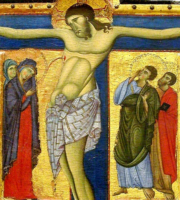 Crusifix._detail.Master_of_st_Francis._Louvre.jpg